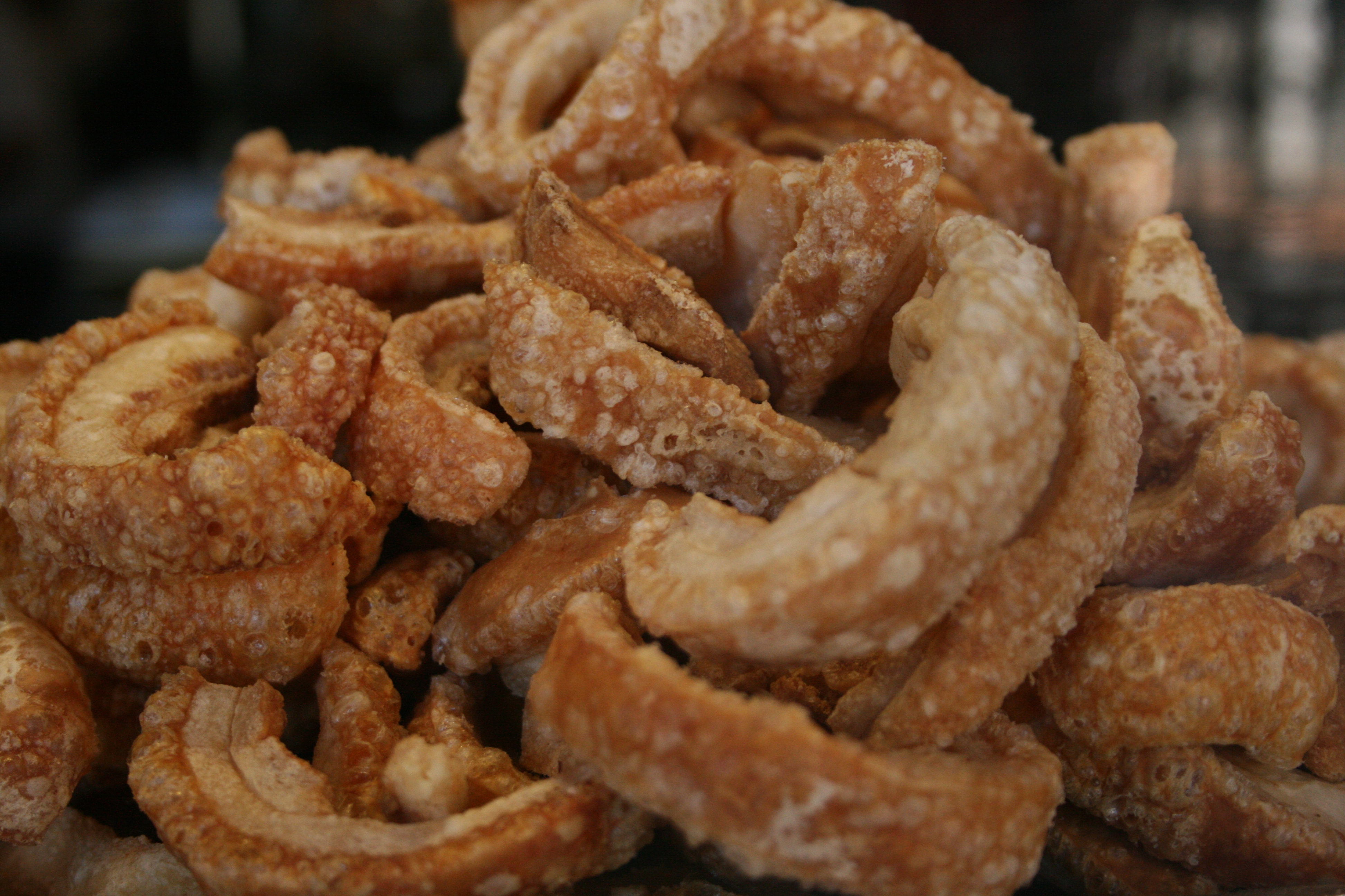 Torreznos